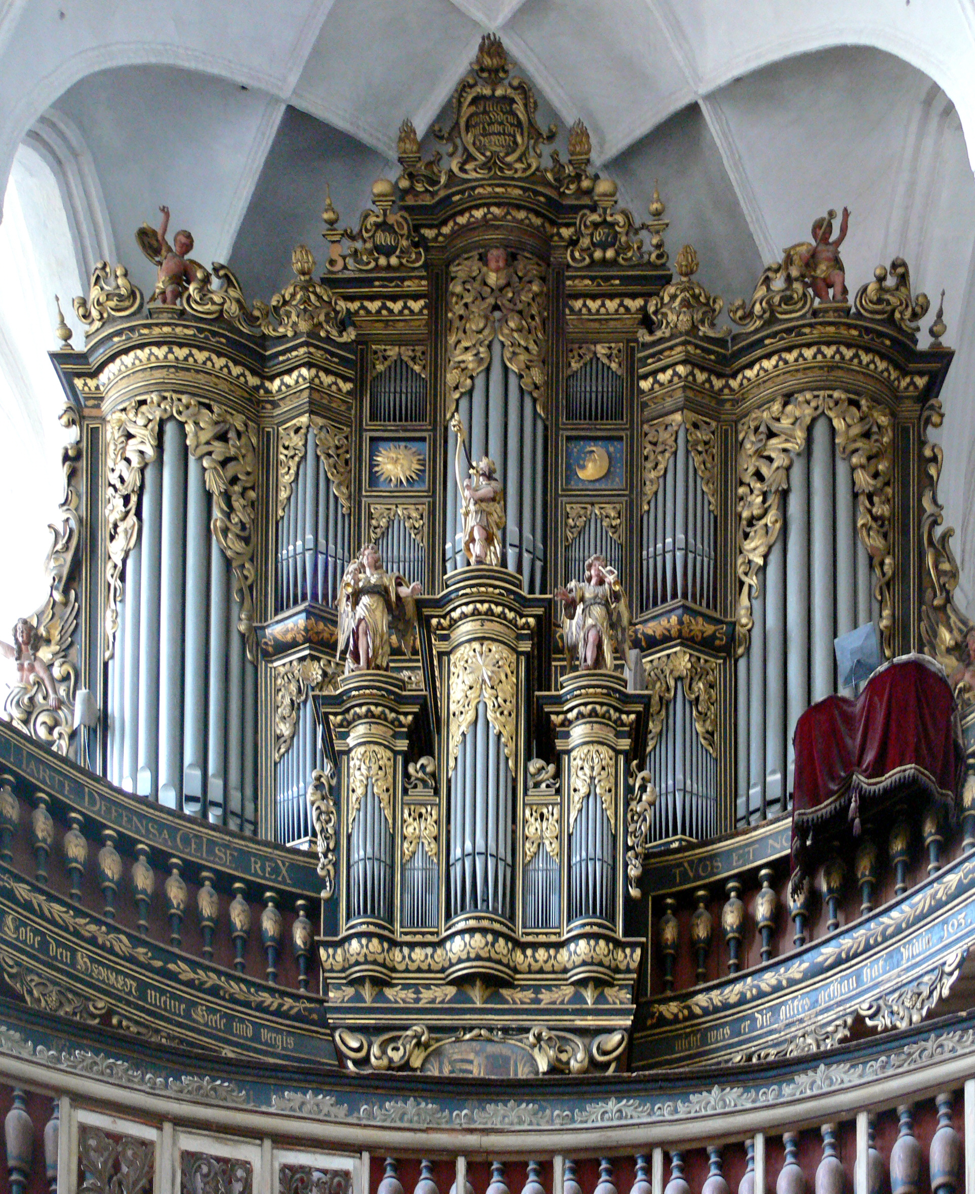 Luckau, Landkreis Dahme-Spreewald, Brandenburg St..-Nikolai-Kirche Orgel von Christoph Donat (1672-1673)